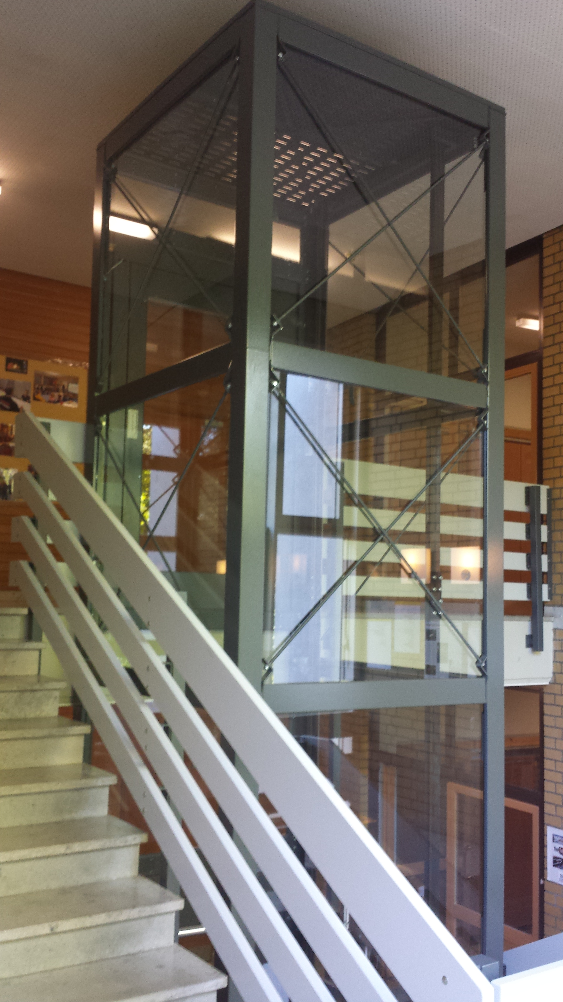 Ein Aufzug in der Kaufmännischen Schule Tauberbischofsheim. Im Jahr 2014 begannen mit der Sanierung der Aula, des Treppenhauses und aller sanitären Anlagen umfangreiche Sanierungsarbeiten am Schulgebäude durch den Main-Tauber-Kreis. Damit die Inklusion von körperbehinderten Schülern gelingen kann, erhielt die Schule neben behindertengerechten Toiletten einen Aufzug (siehe Bild), um eine Barrierefreiheit zu ermöglichen. 2015 wurde die umfassende Sanierung des Schulgebäudes abgeschlossen.